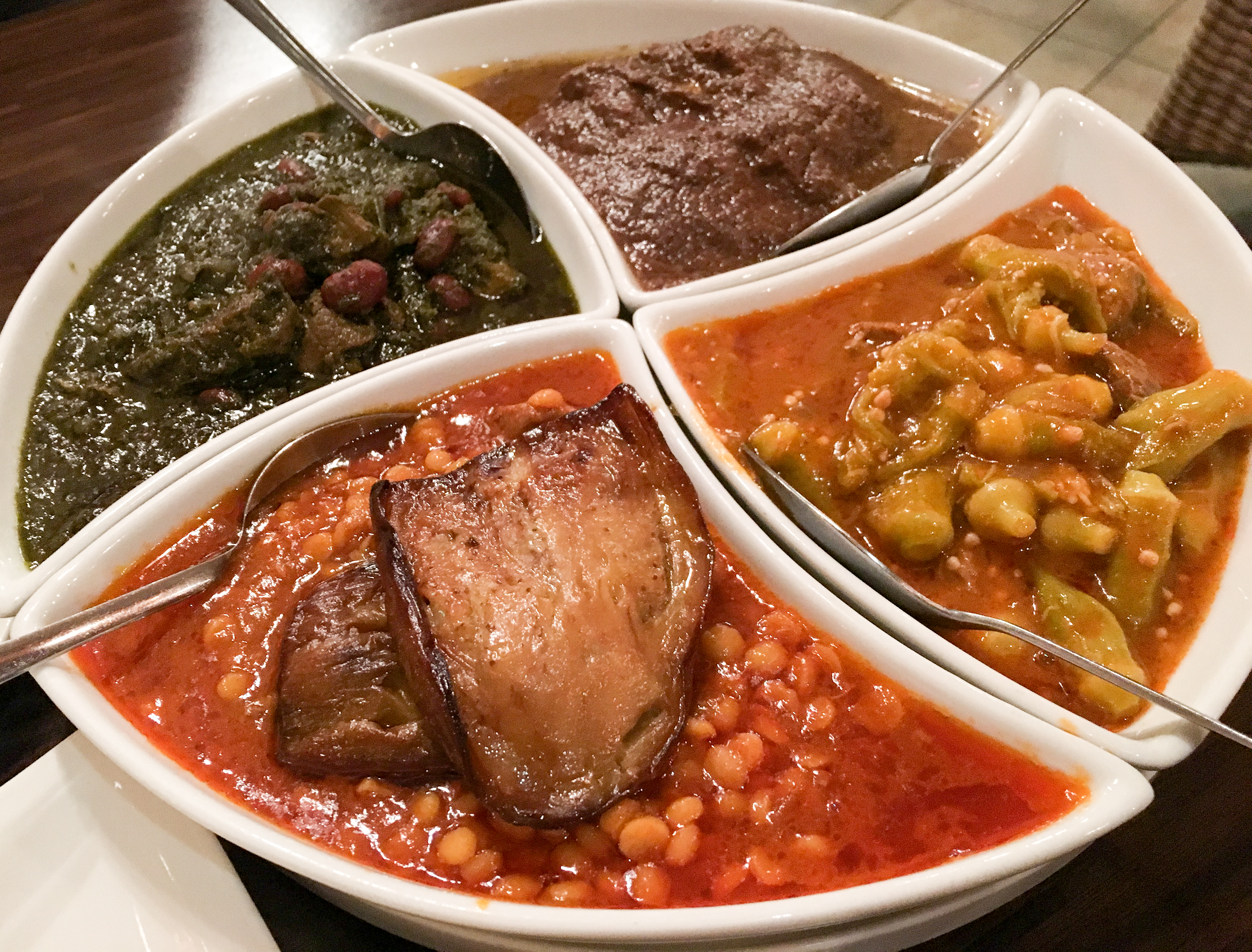 Persische Küche, diverse Hauptspeisen von oben im Uhrzeigersinn: Fessendjan, Bahmieh mit Lamm, Gheymeh, Ghorme Sabzi